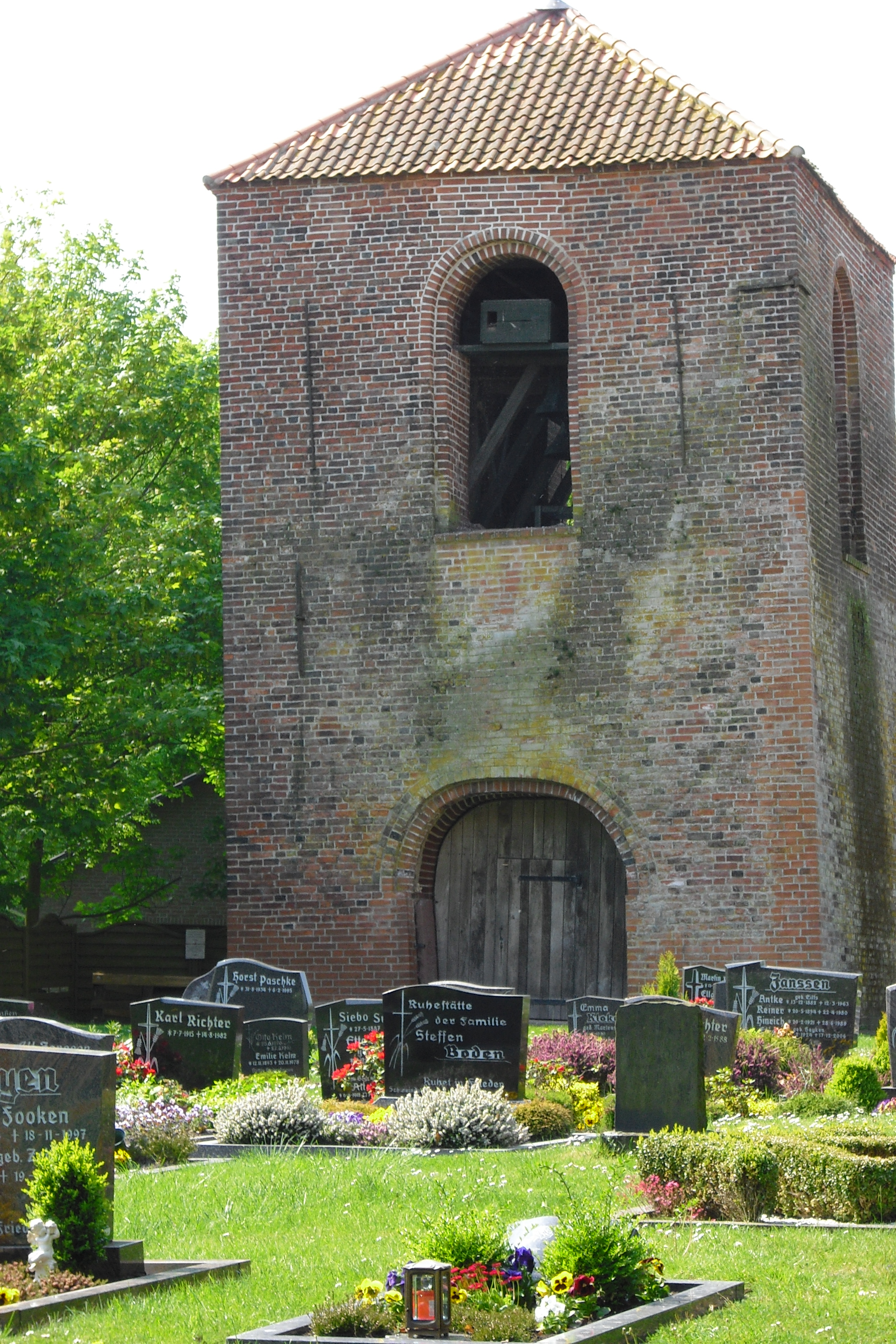 Glockenturm der evangelischen Kirche Westochtersum